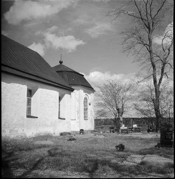 Torsåkers kyrka i Torsåkers socken, Gnesta kommun. Koret och västra delen av långhuset mot sydväst.